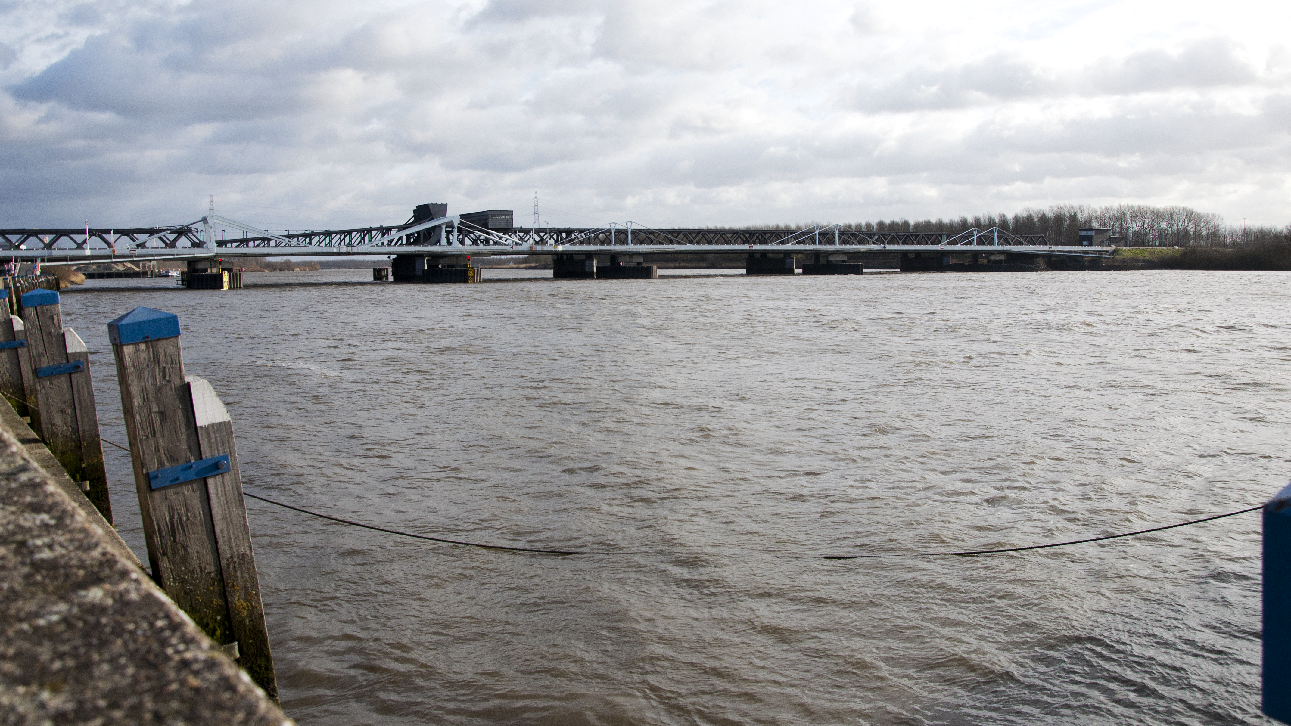 De Scheldebruggen te Temse, België